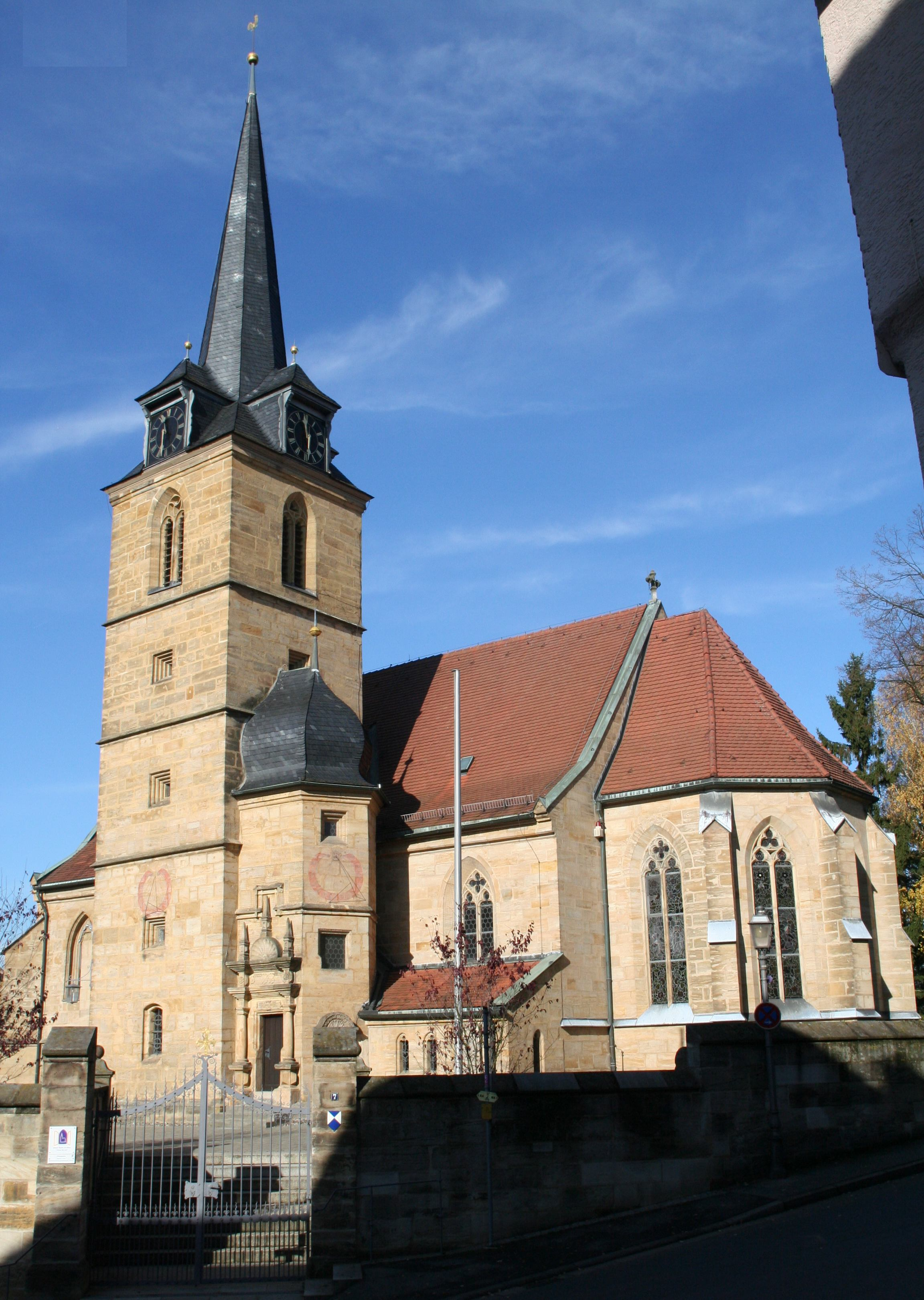 evangelische Jakobikirche in Küps in Oberfranken